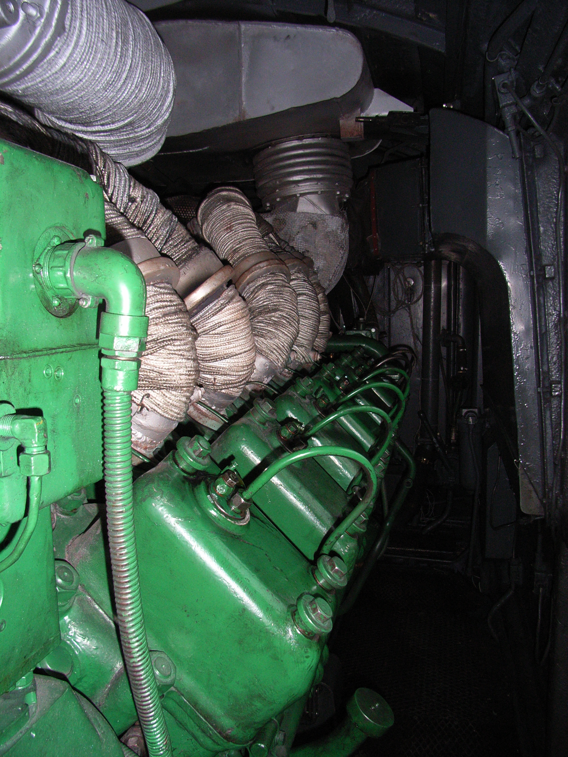 Blick in den Maschinenraum der PKP-Baureihe SU46 mit dem 12-Zylinder-Dieselmotor W2112SSF